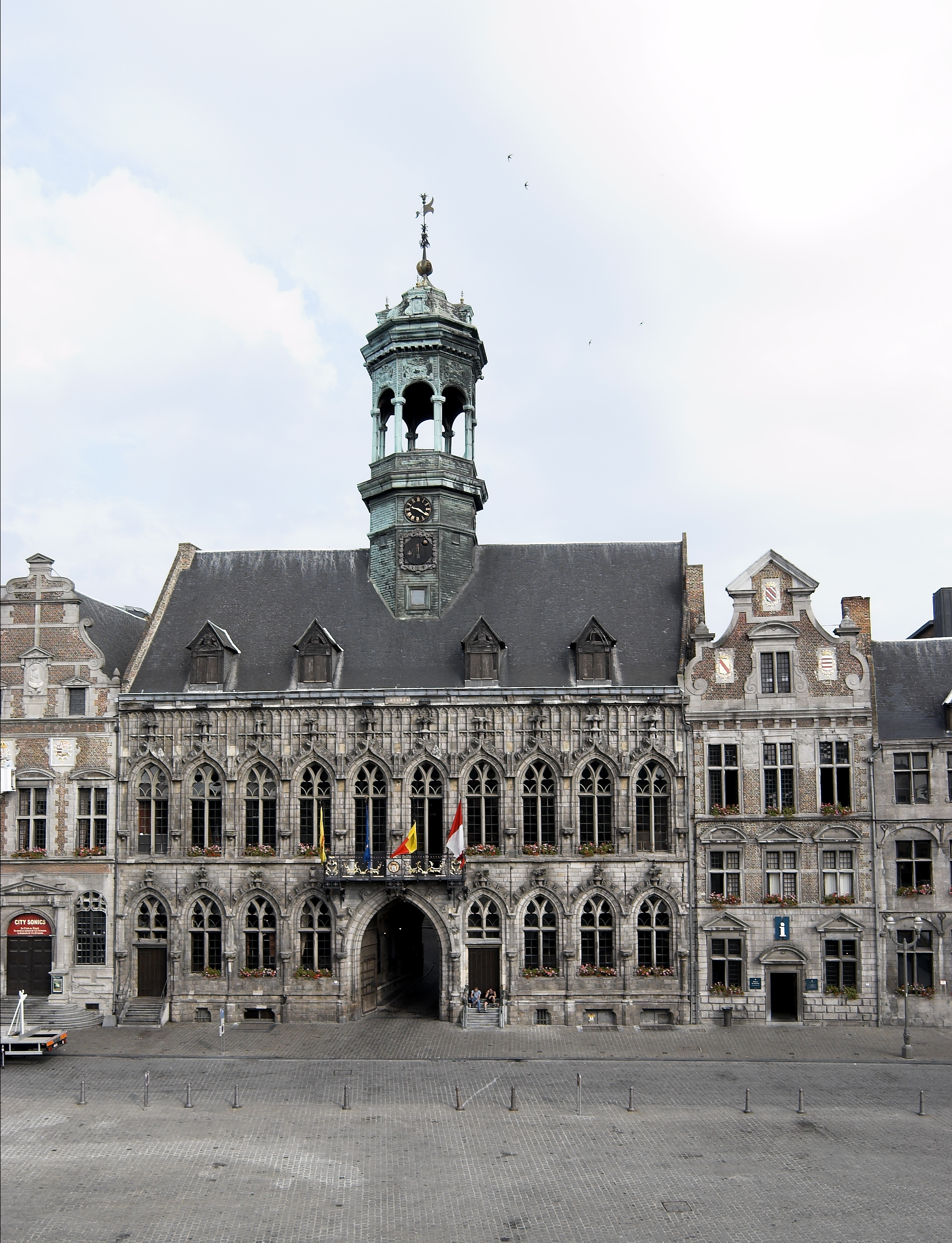 Hôtel de Ville de Mons, le 11 juillet 2006. Photo Lefrancq. Mons